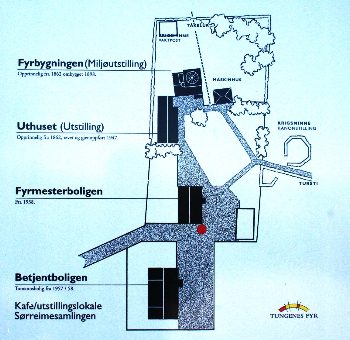 Tungenes Fyr, Tafel mit Lageplan